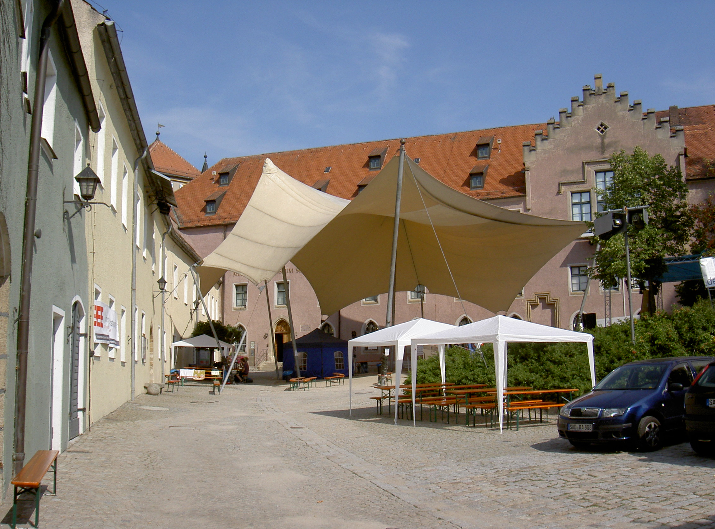 Neunburg vorm Wald, Im Berg 12